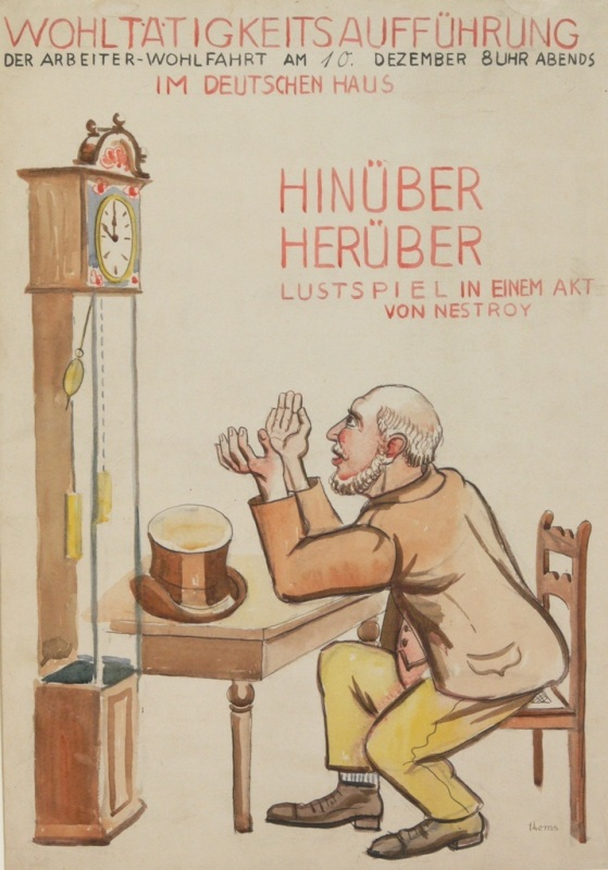 Titel: Plakatentwurf Hinüber - Herüber. Tusche, Aquarell auf Papier. Maße: 625 x 445 mm.